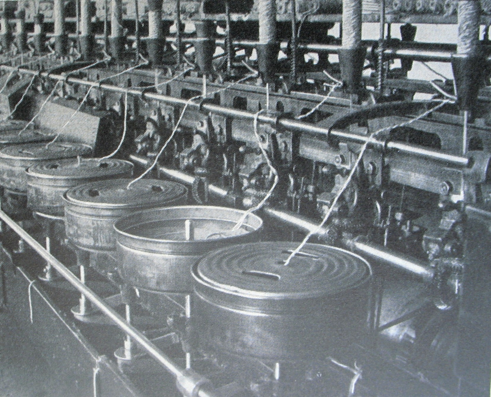 Dosenspinnmascine (Baujahr ca 1930)